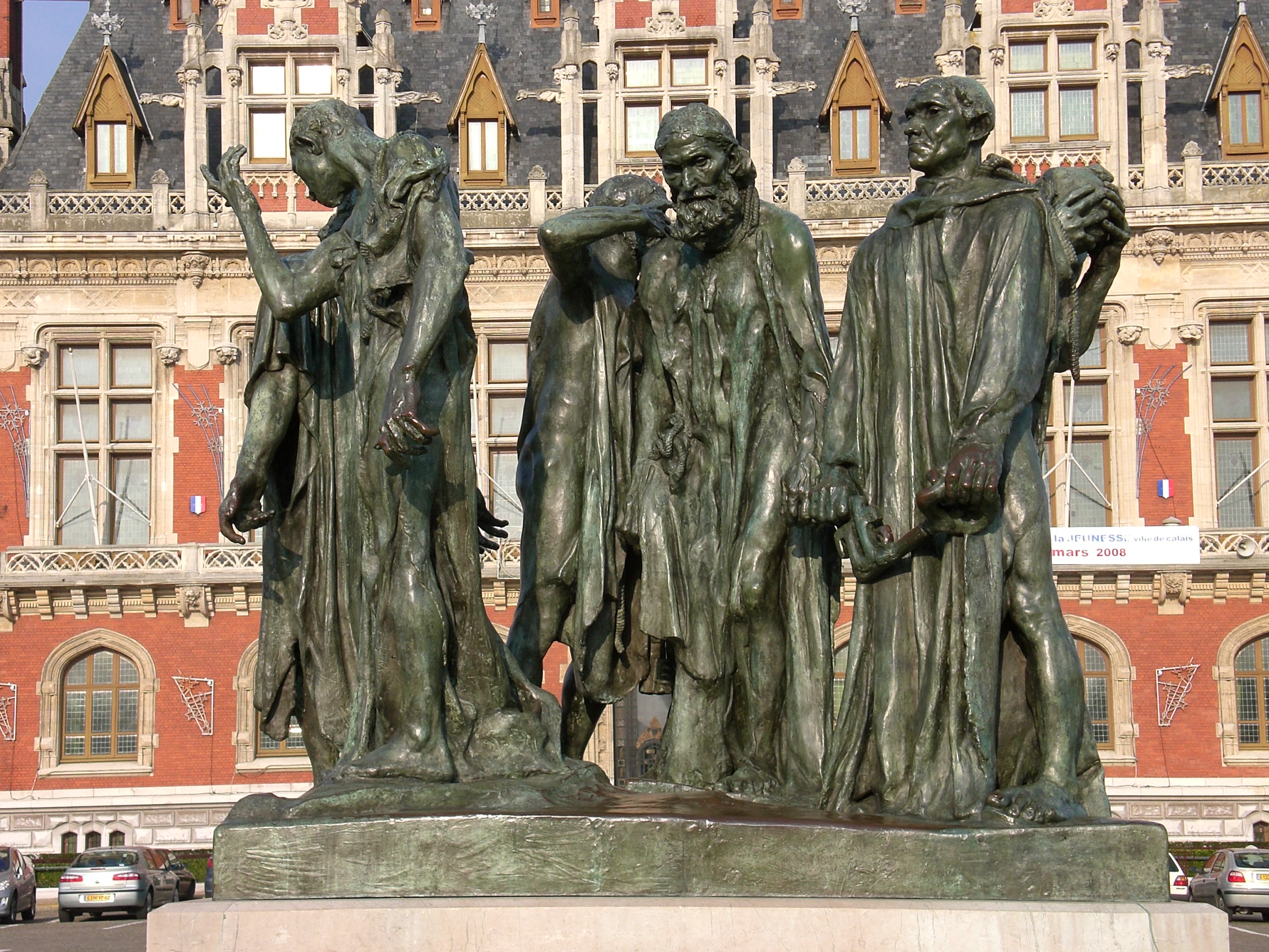 L'arrière plan de cette photo est l'Hôtel de Ville de Calais car la statue est présente juste devant.